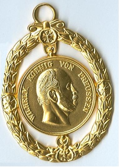 Scan. Particuliere verzameling Groningen.(mijn eigen verzameling) Robert Prummel 2007